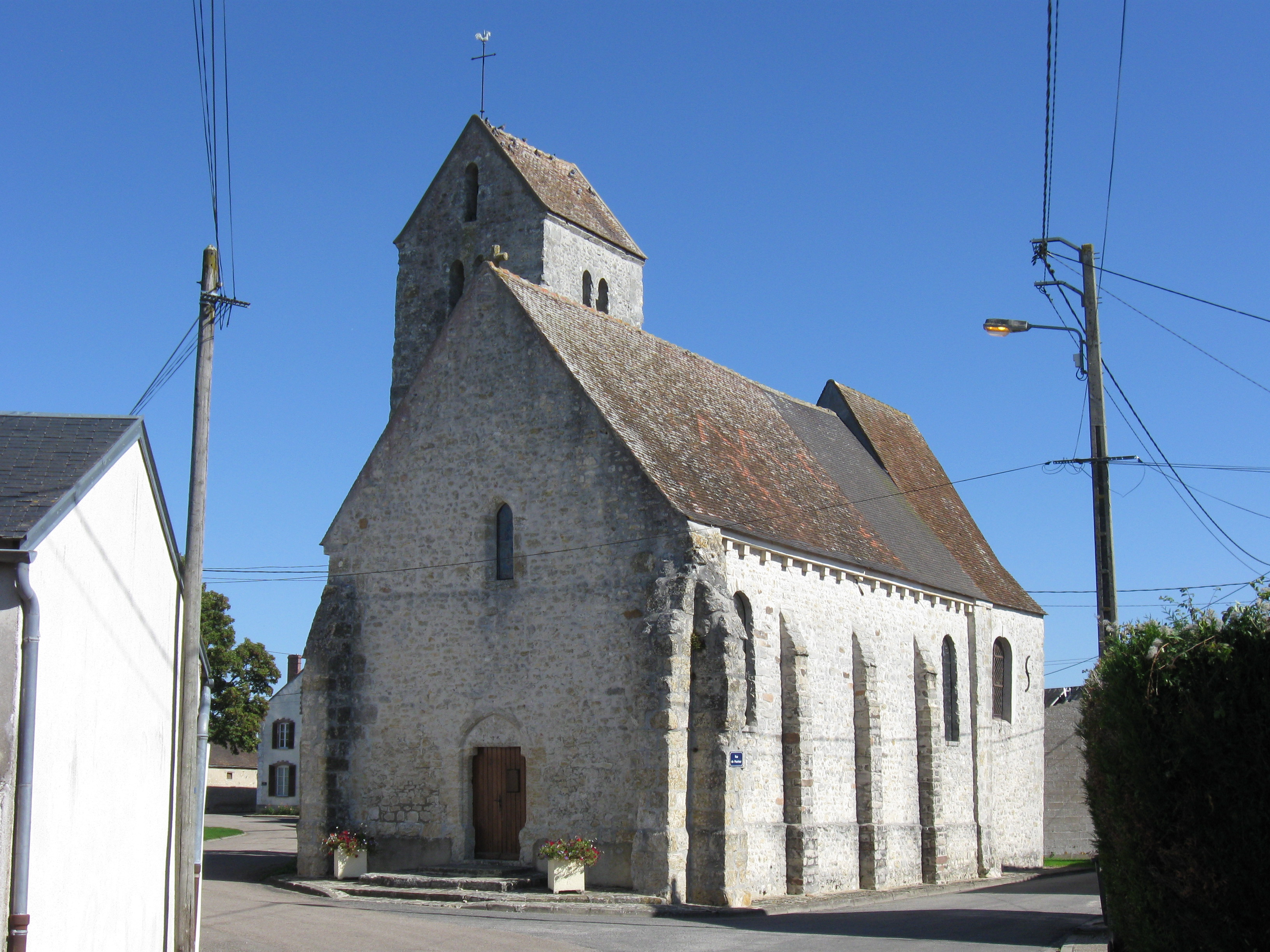 Église Saint-Germain d'Obsonville. (Seine-et-Marne, région Île-de-France).